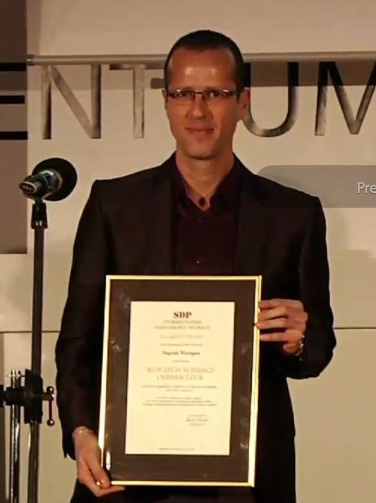 ניסן צור, 2013